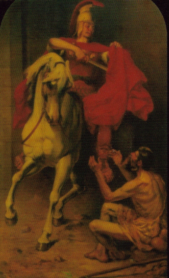 Oltárkép a kisszőlősi római katolikus templomban: Szent Mártont mint római lovas katonát ábrázolja, amint köpenyét megosztja a didergő koldussal (sem a festő neve, sem az alkotás éve nem ismert)